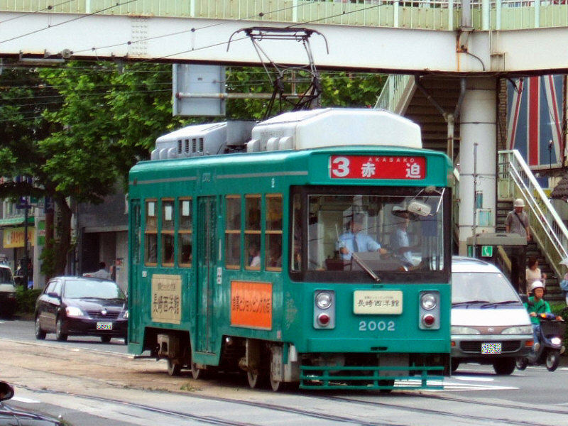 長崎電気軌道2000形電車（長崎駅前電停付近にて）